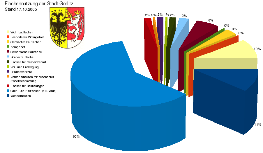 Flächennutzung der Stadt Görlitz